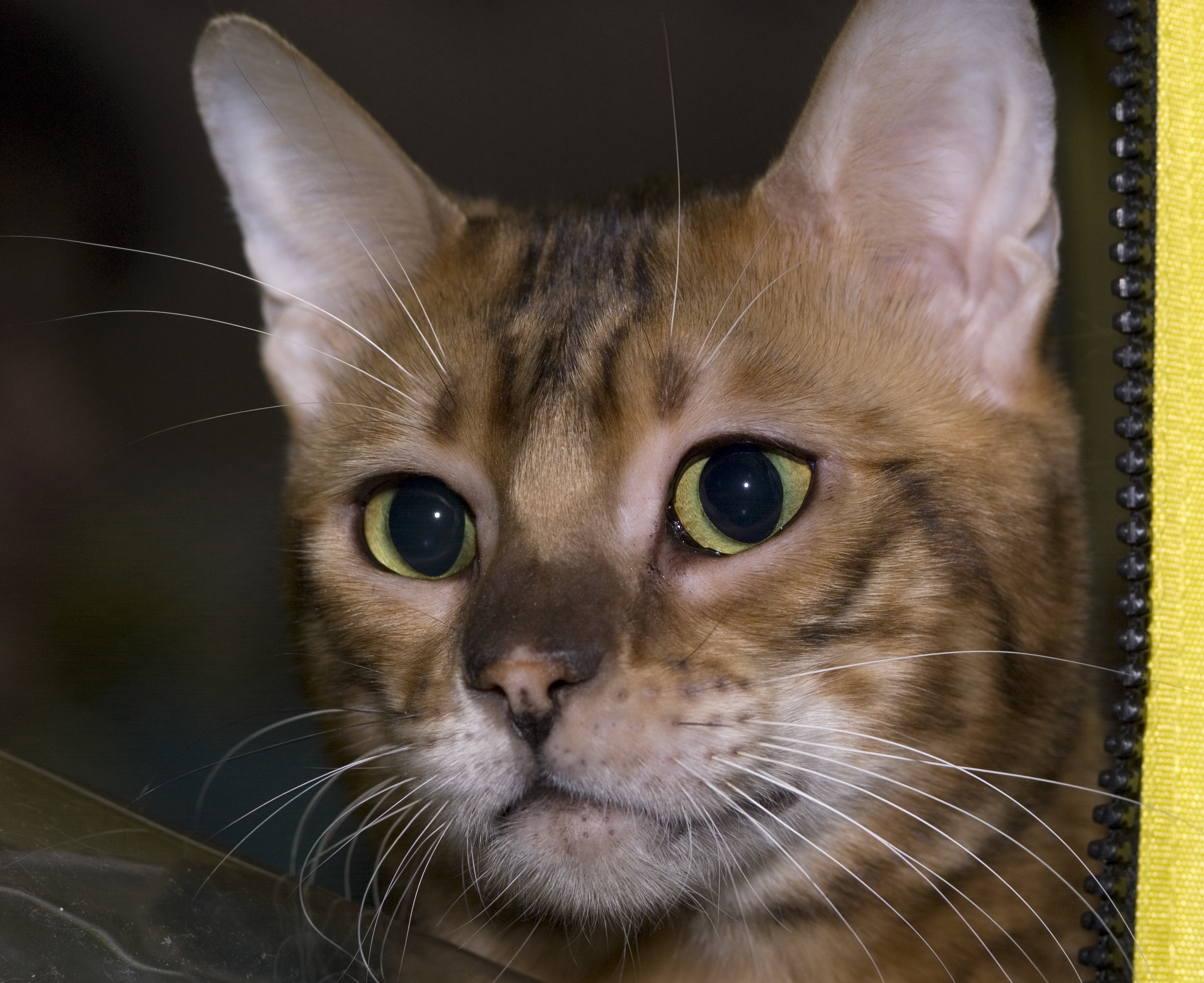 Тойгер Eeyaa American Idol, №1108 по каталогу «Гран При Royal Canin». Кот. Окрас: чёрный тигровый (TGR n 23). Дата рождения: 09/09/2007. Владелец: Л.Назалина. Клуб «Алиса-Бест», Москва